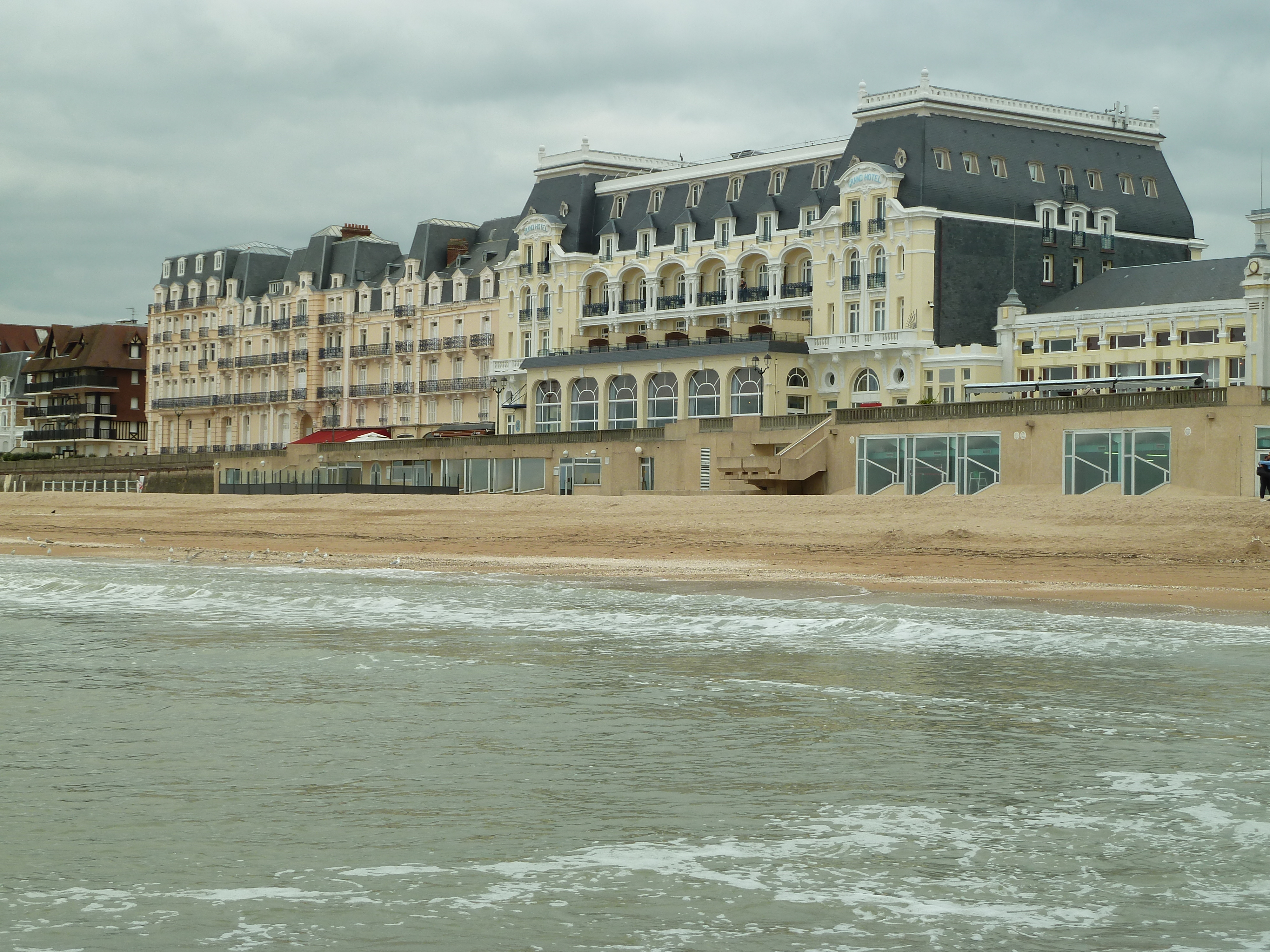 Casino de Cabourg – Cabourg – Calvados – France – Mérimée PA00125293 .